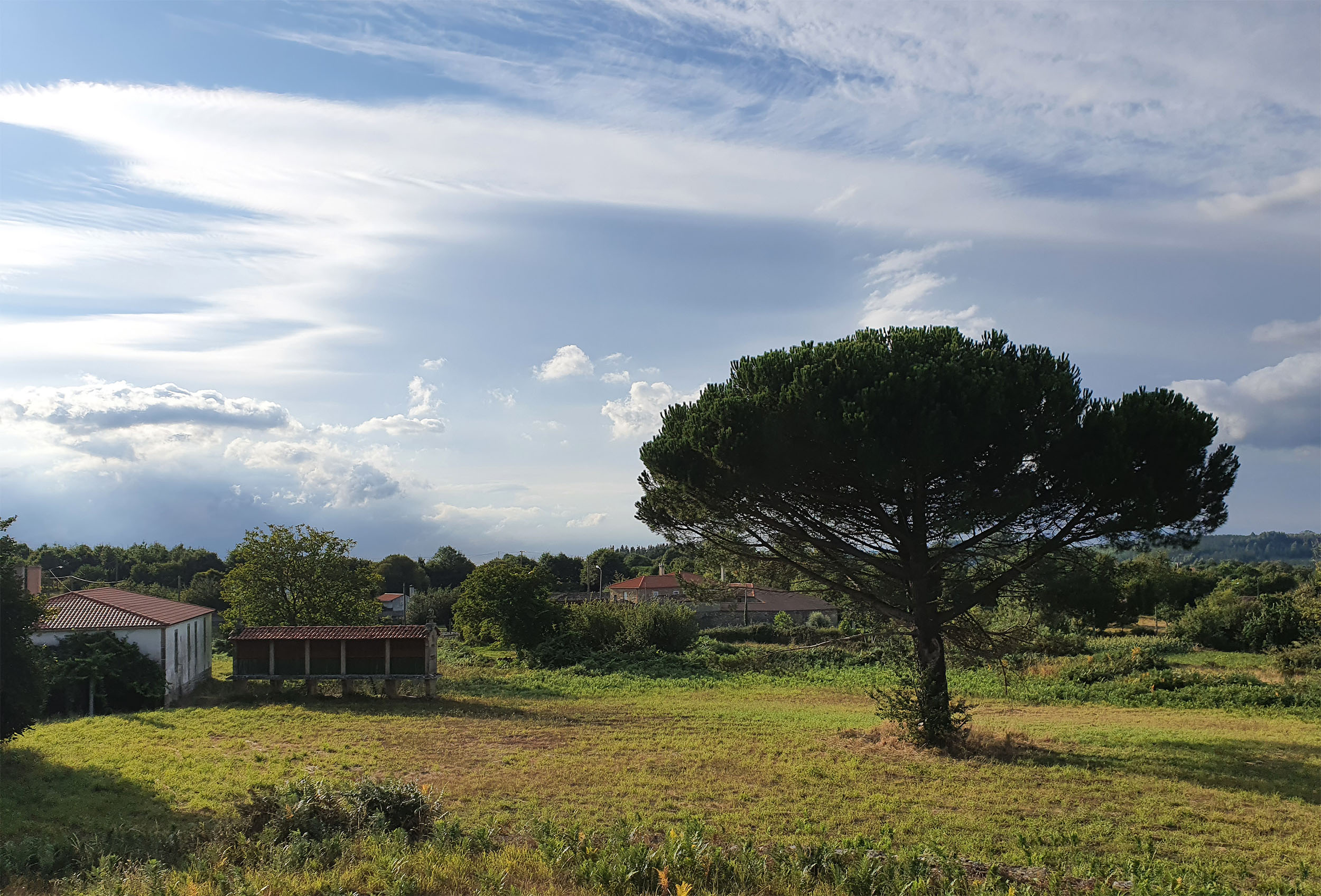 Lugar de Mancegar coñecido como Outeiro, que aparece incluído na parroquia de Alvidrón (Antas de Ulla), aínda que cómpre reseñar que esta aldea está fraccionada entre as parroquias de Vilapoupre e Alvidrón. Non é doado delimitar sobre o terreo esta división, xa que hai vivendas pertencentes a unha e outra parroquia estando ubicadas a contrapé das direccións de cada unha das citadas parroquias. Outeiro non escapa desta situación, pois abrangue vivendas pertencentes a Vilapoupre e a Alvidrón. Na imaxe, tomada desde a parte alta do lugar, recóllese a "Casa de Estevo" de Mancegar (Alvidrón).